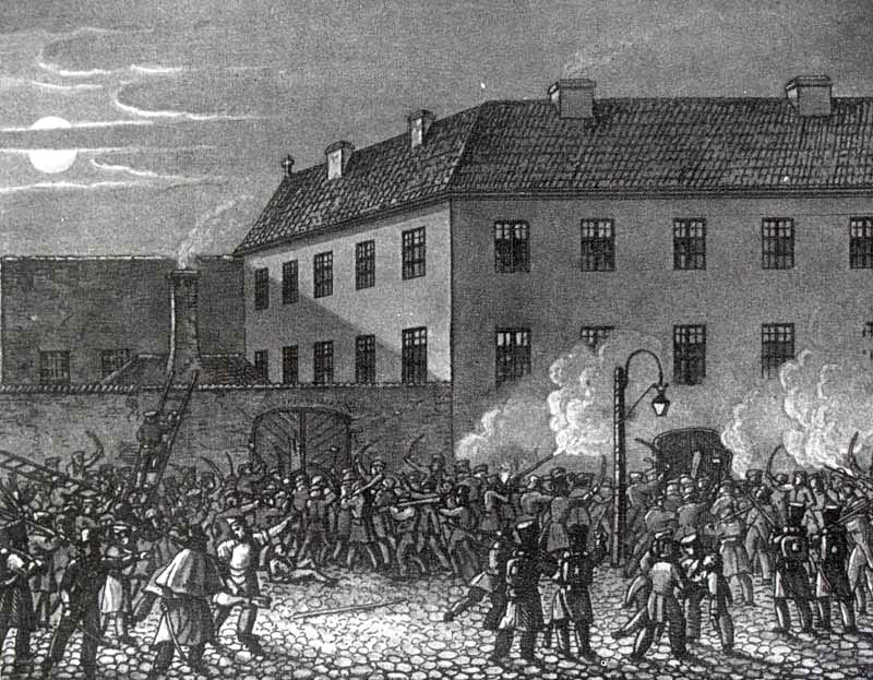 Zdobycie więzienia na Lesznie w Warszawie 1830